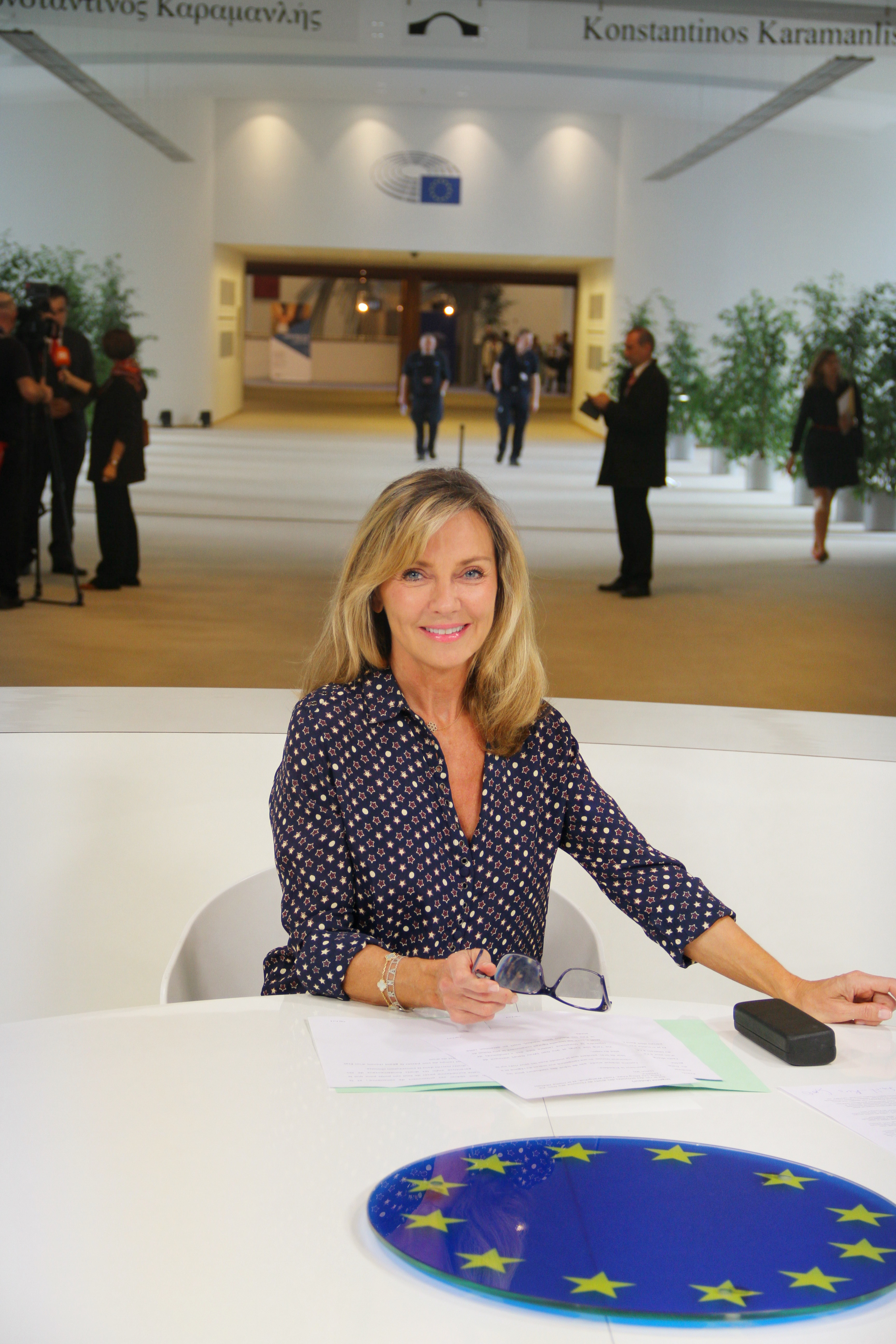 Au Parlement européen